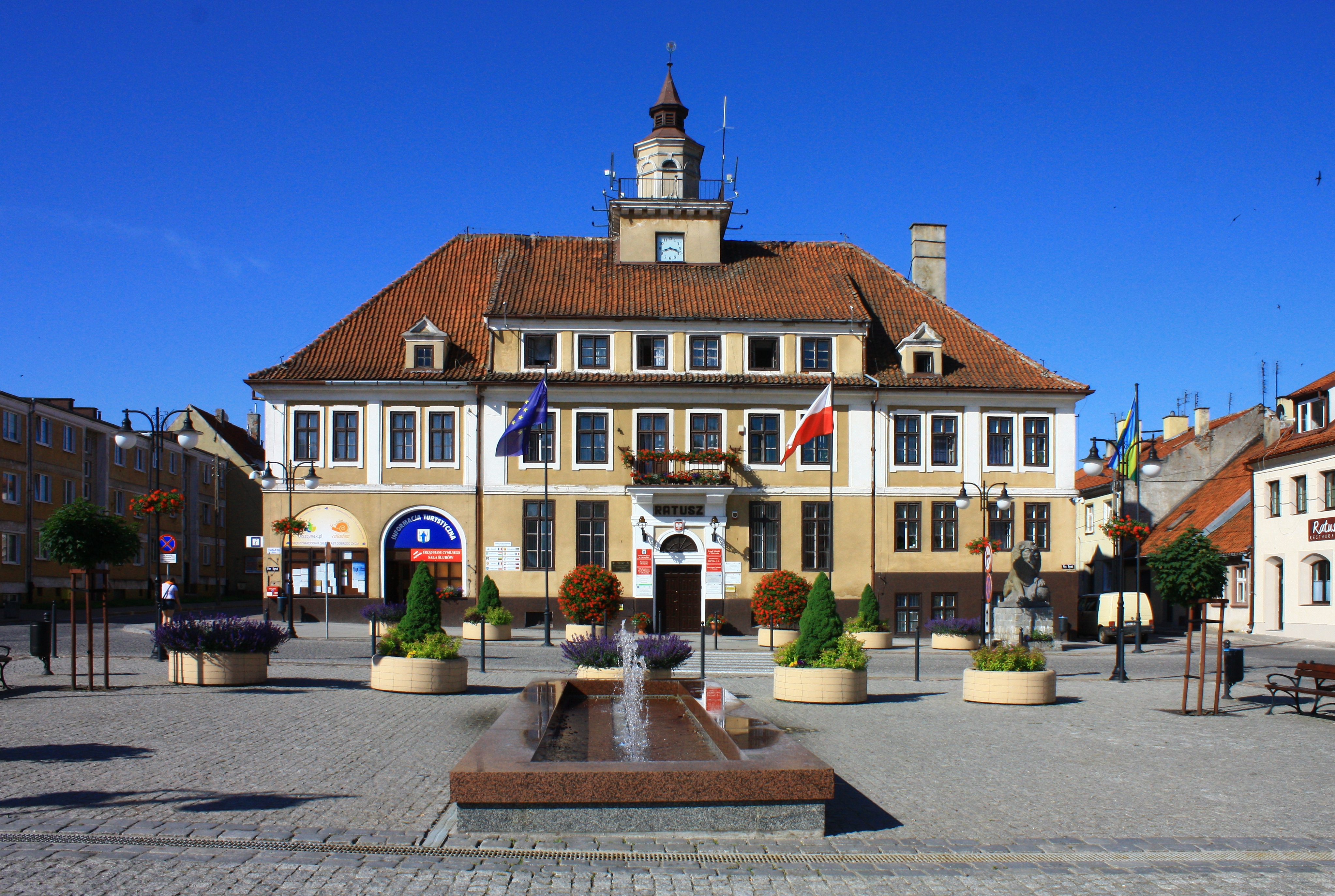 Olsztynek, ratusz, 1915-1923